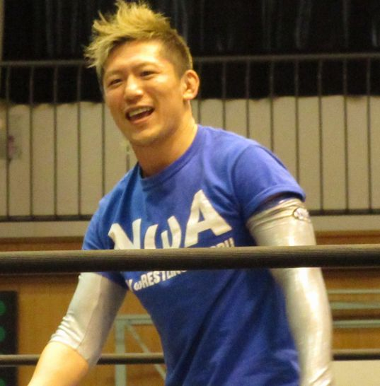 2016.7.30奈良